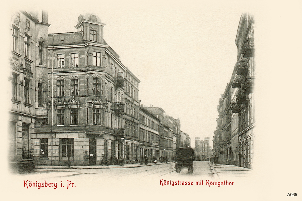 Königsberg